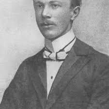 Matějka Josef spisovatel (1879-1909)